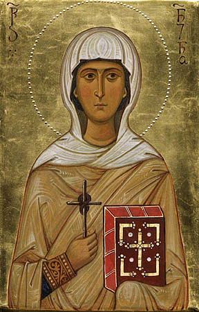 Saint Nino